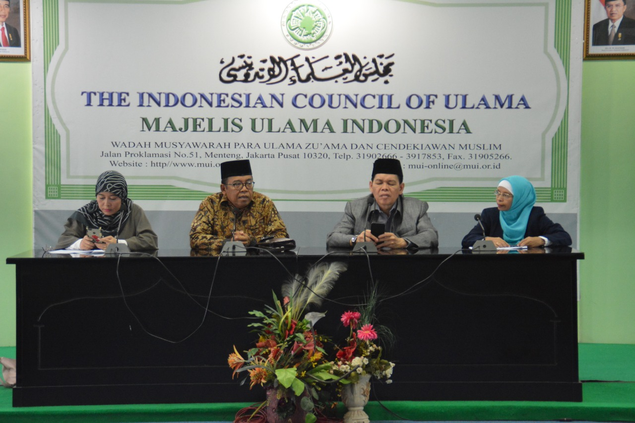 Konferensi pers Pantauan Ramadhan tahun 2019